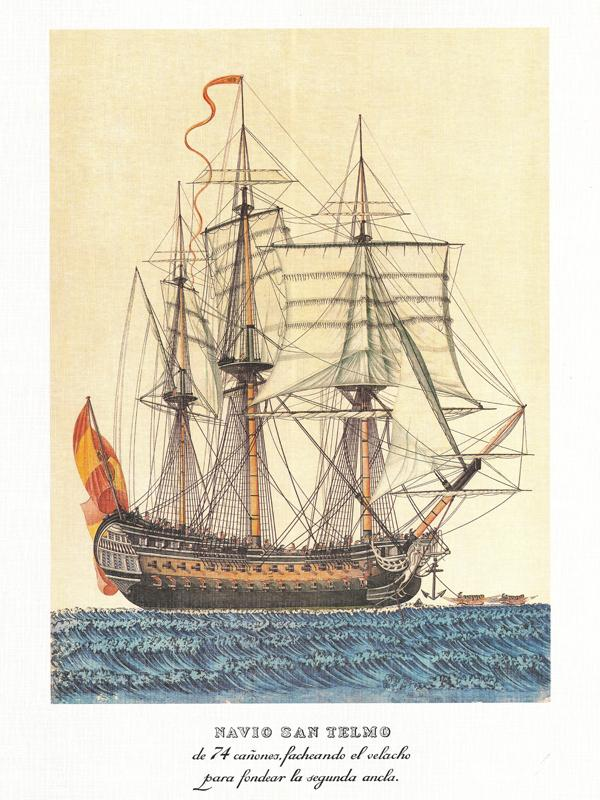 Navío San Telmo de la Armada Española, realizado por Alejo Berlinguero (1750-1810), museo naval de Madrid